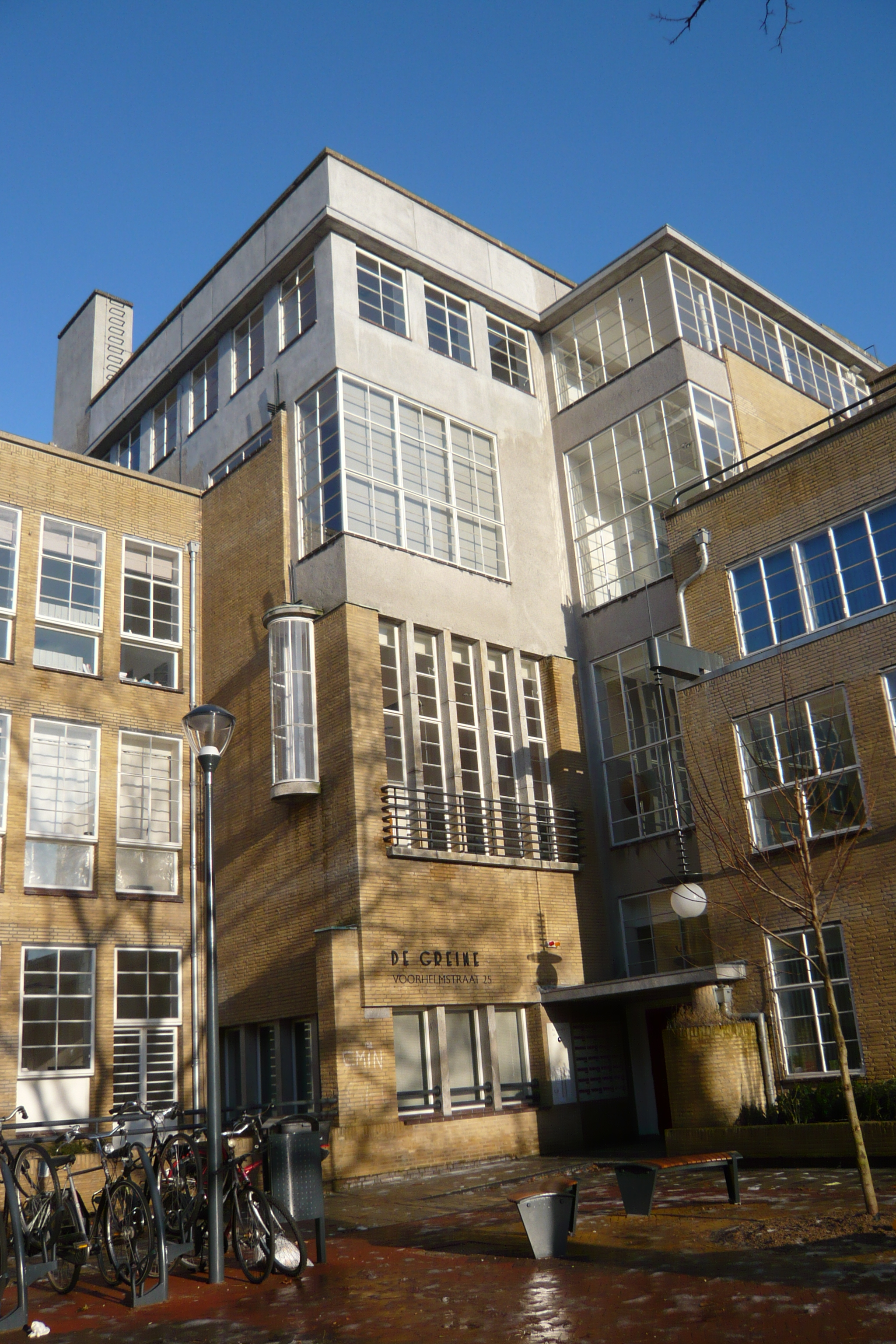 Ingang De Greine-Voorhelmstraat Haarlem